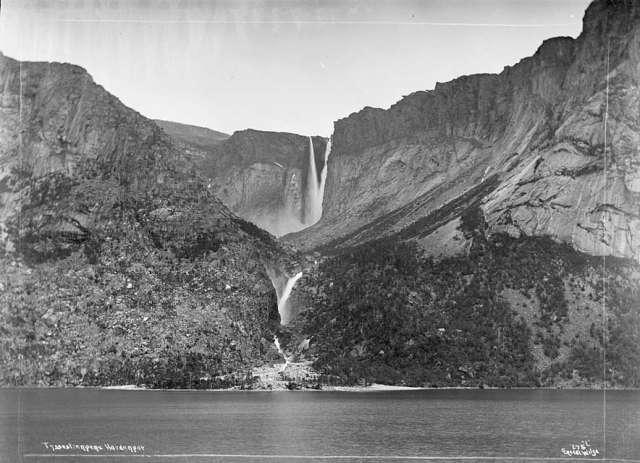 Tyssestrengene fotografert frå Ringedalsvatnet